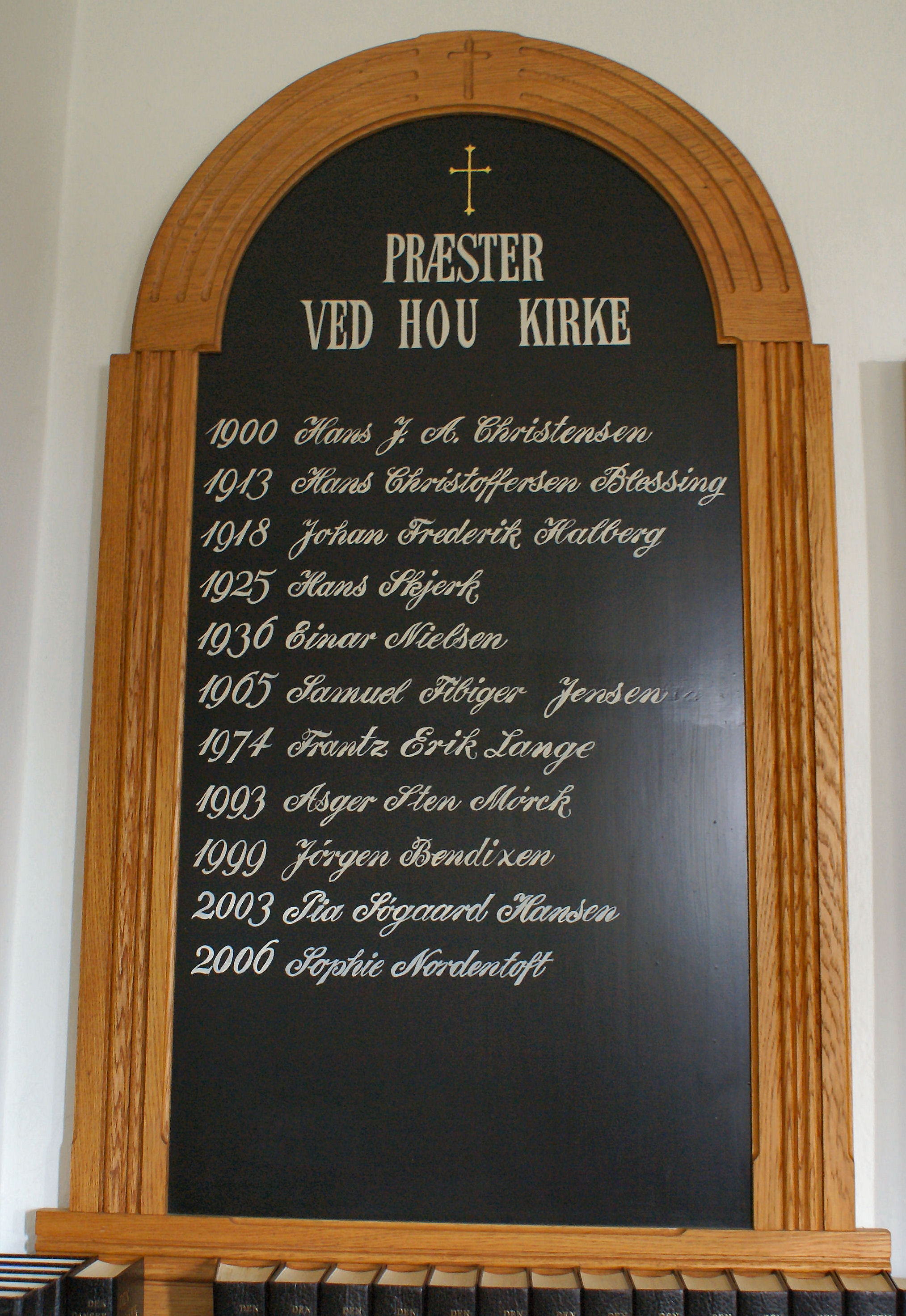 Hou Kirke, præstetavle